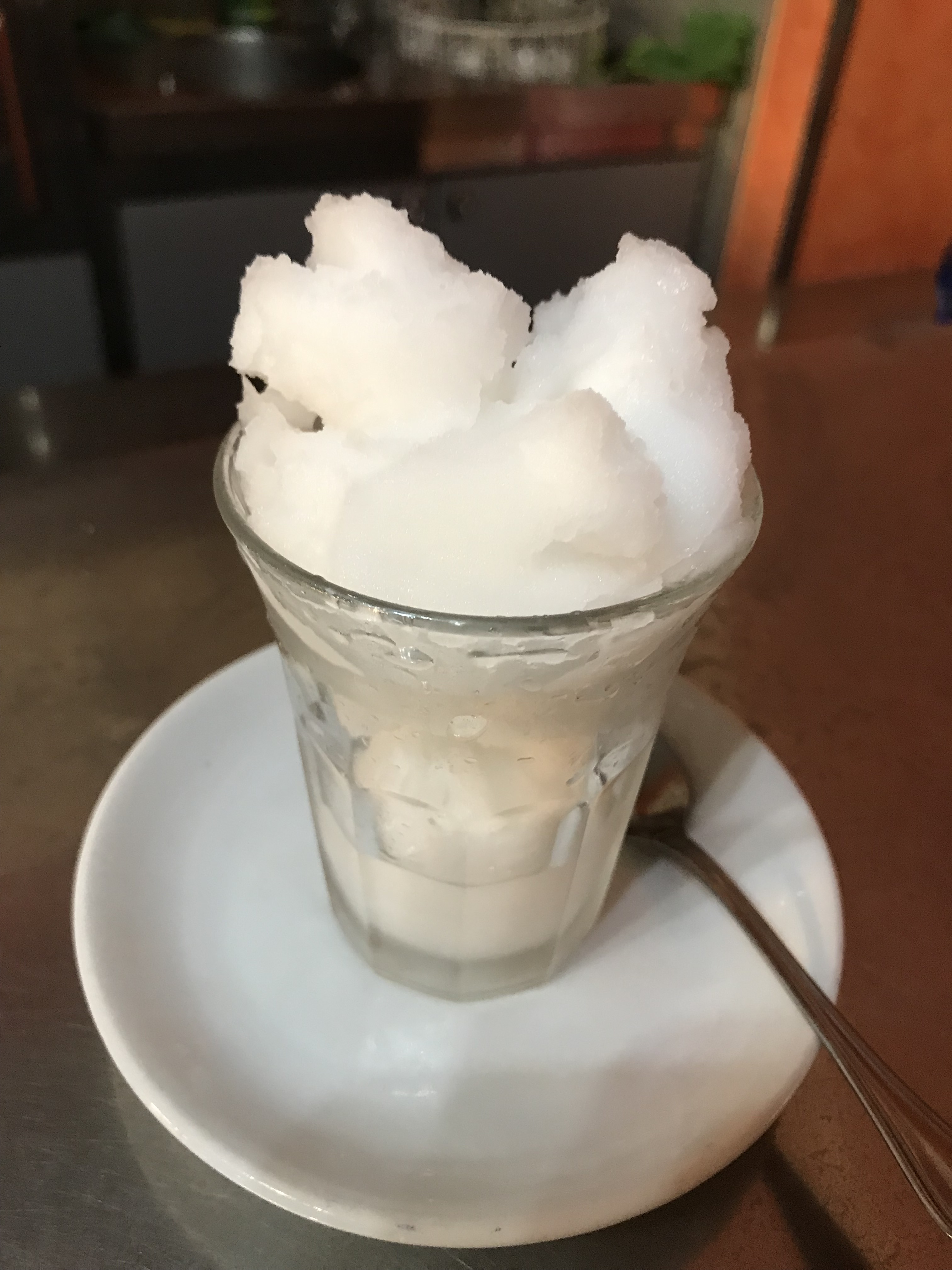 Granita originelle au citron de Sicile et son aspect de neige